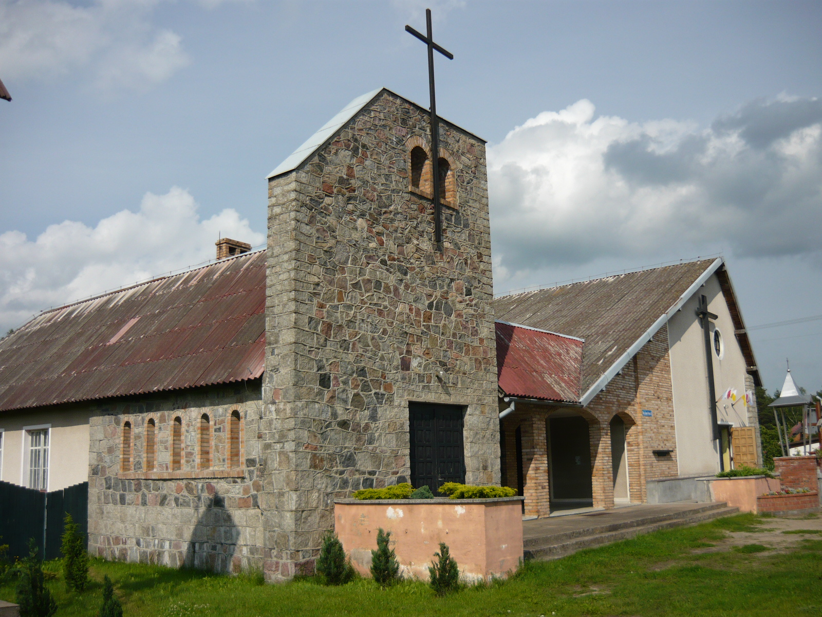 Gródek, Pl. Jana Pawła II 1/1 - rzymskokatolicki kościół parafialny pw. Miłosierdzia Bożego.